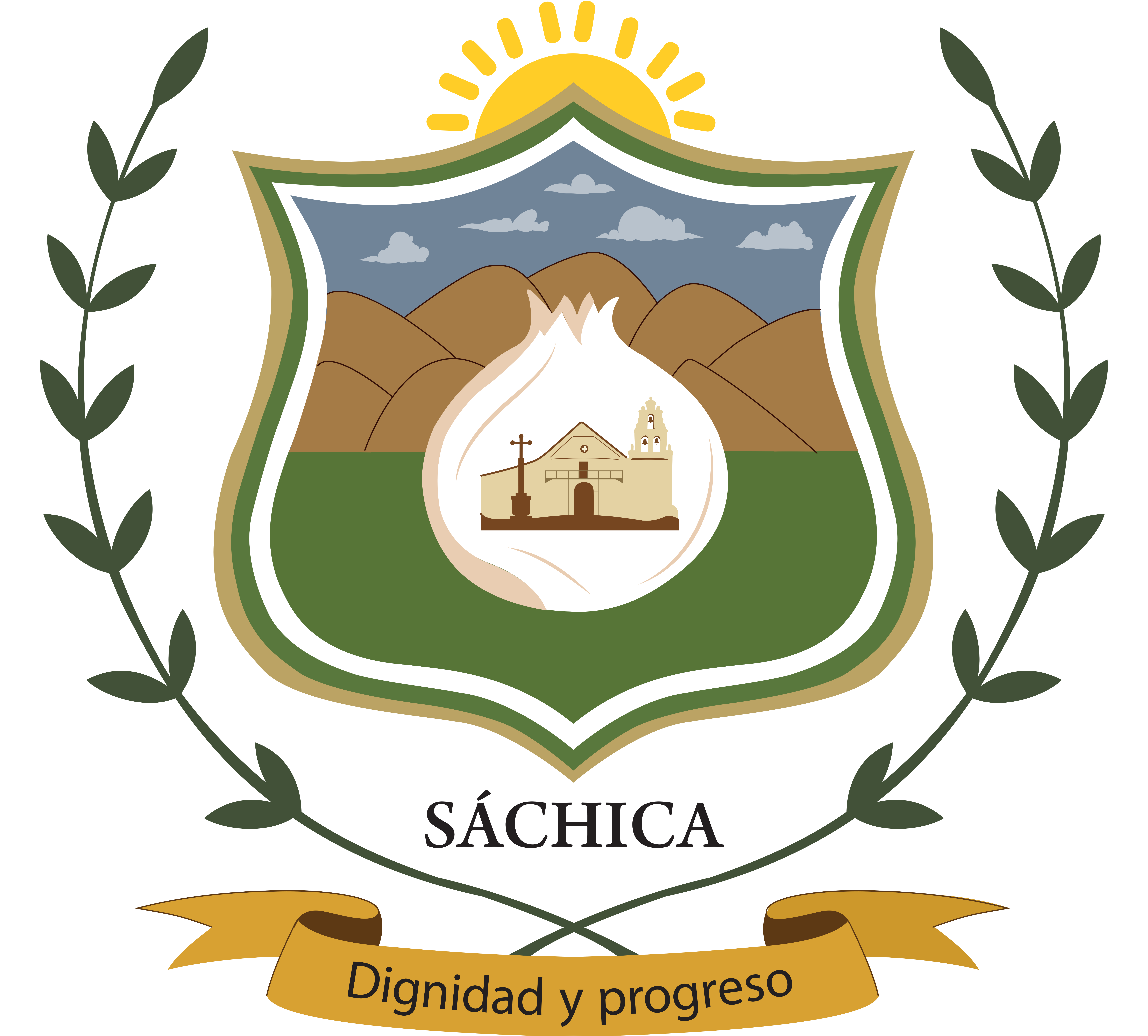 Escudo Oficial de Sáchica